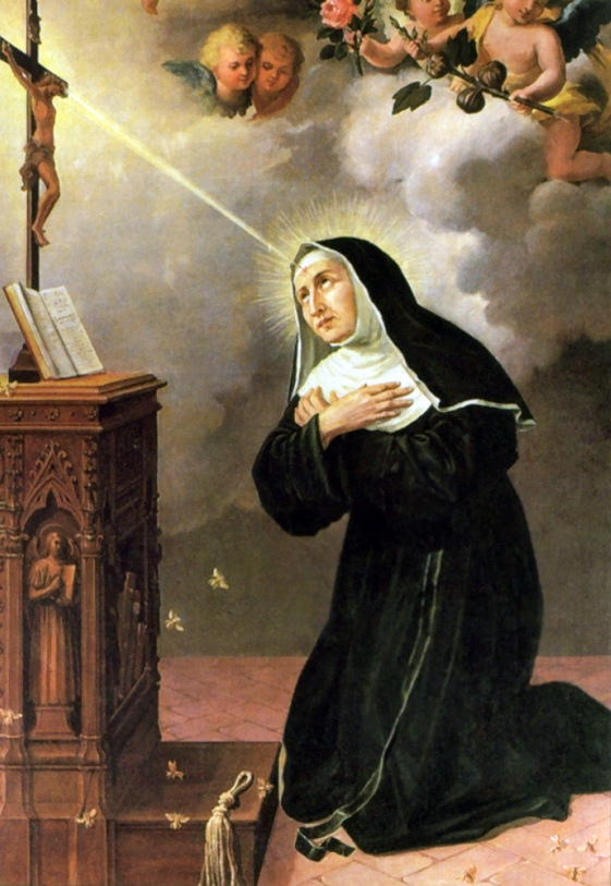 Andachtsbild - Rita von Cascia (+ 20. Mai 1447)